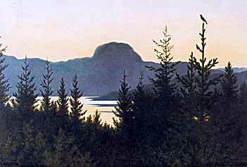 Andersnatten